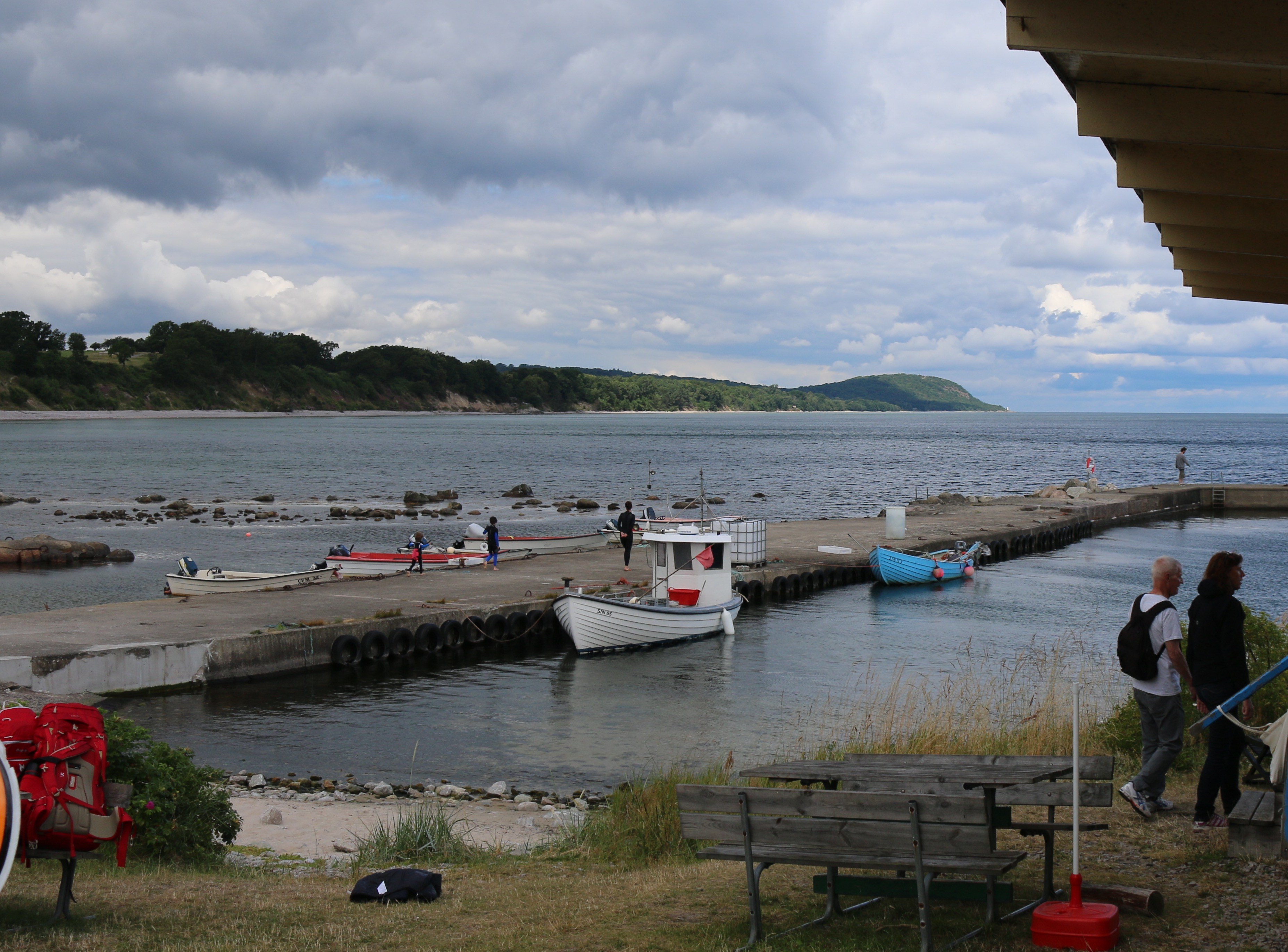 Hamnen i Vik sommaren 2015